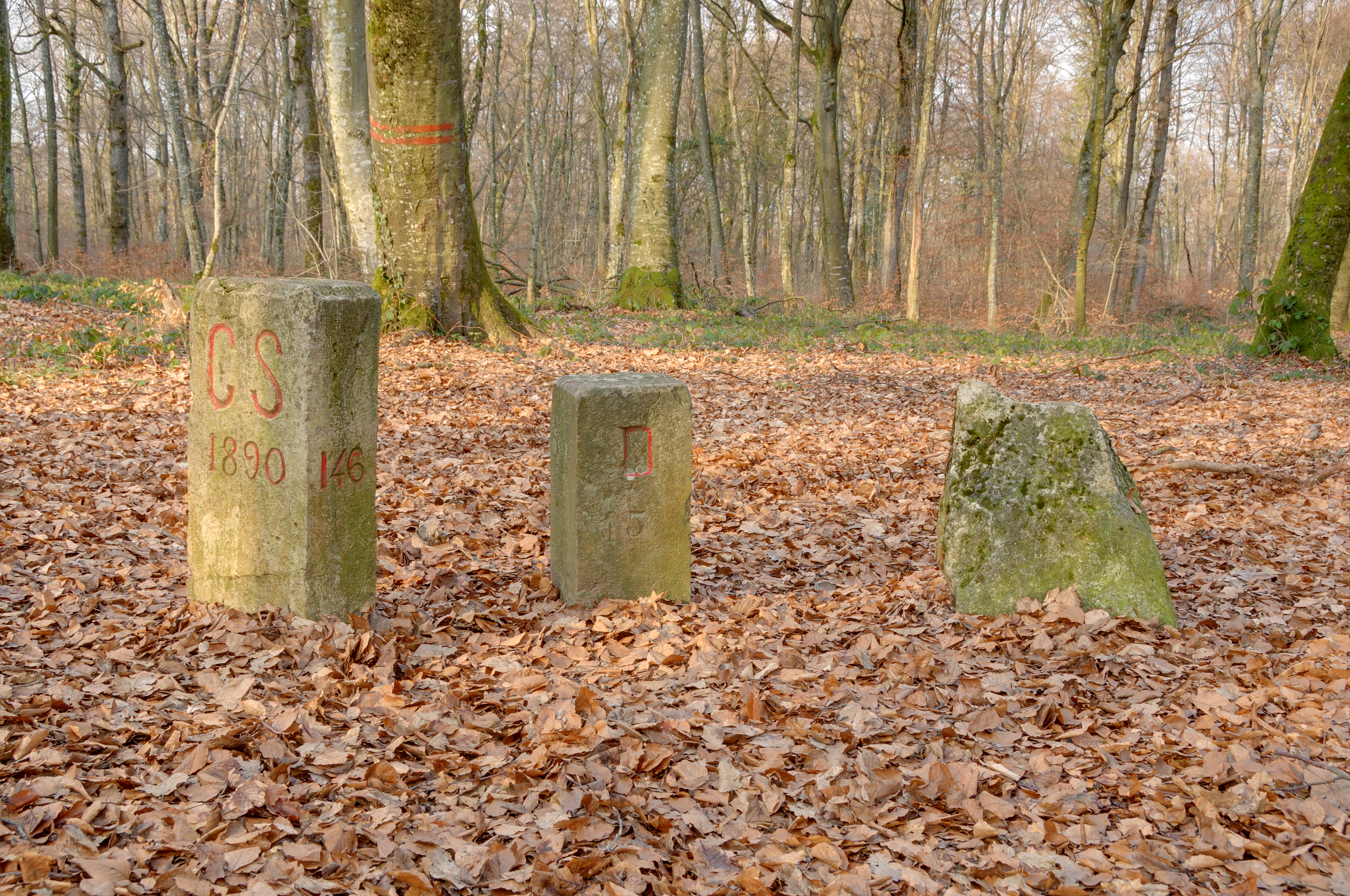 This photograph was taken with a Nikon D300 Site de la borne des Trois Puissances. A gauche, la borne des trois puissances. Au milieu, une des bornes marquant la frontière entre la France et l'Allemagne (l'Alsace-Lorraine était annexée, conséquence de la guerre de 1870-1871). A droite, ce n'est que la base d'une borne datant de l'époque des Habsbourg (HDR).